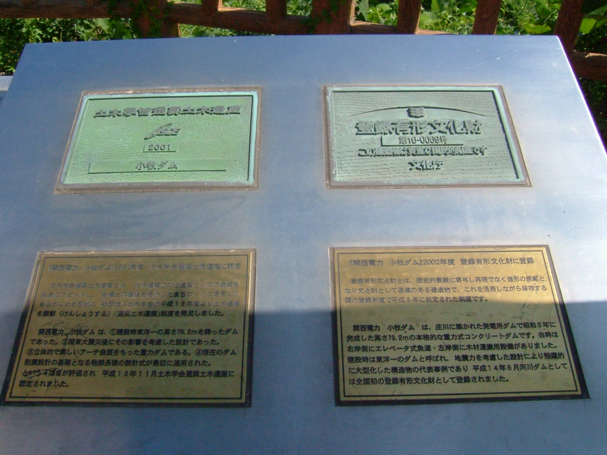 小牧ダムのダムサイトには登録有形文化財と土木学会選奨土木遺産に登録・認定されたことが記されている。